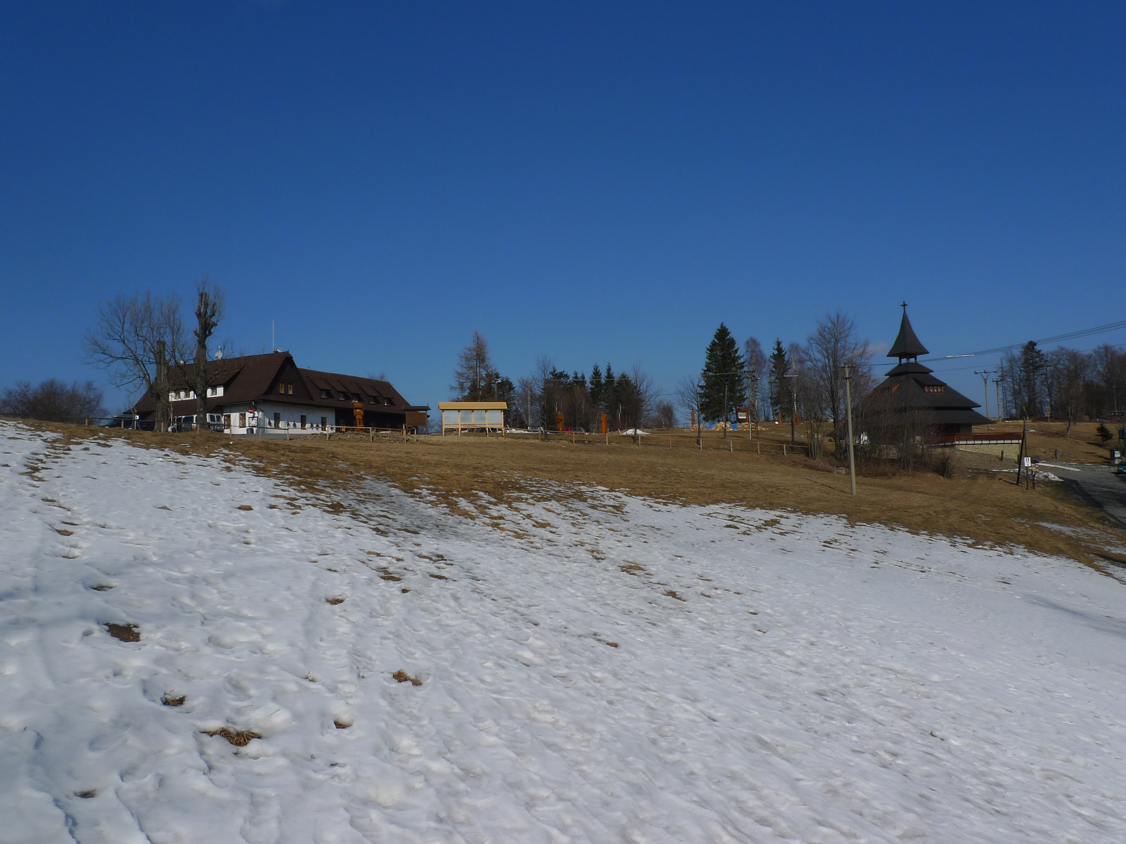 Chata Čarták a zvonička na Soláni